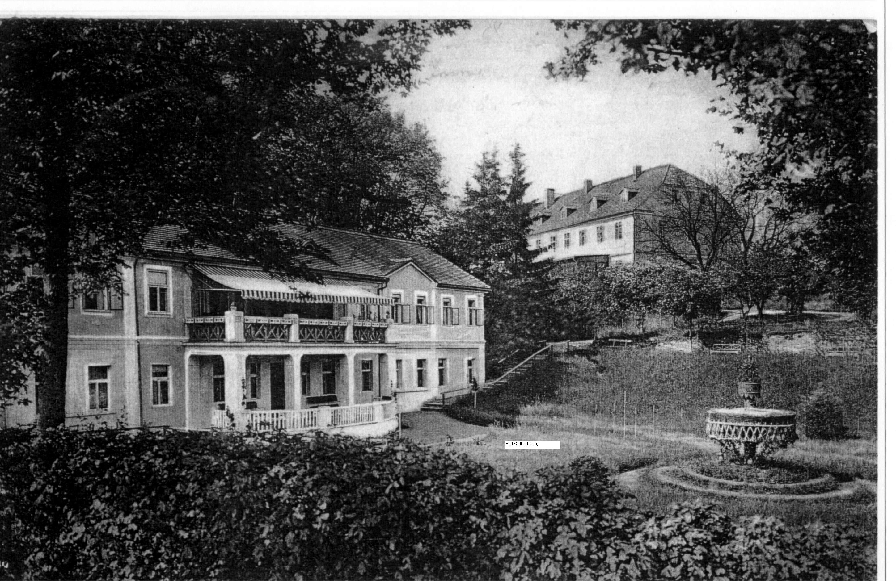 Bad Geltschberg